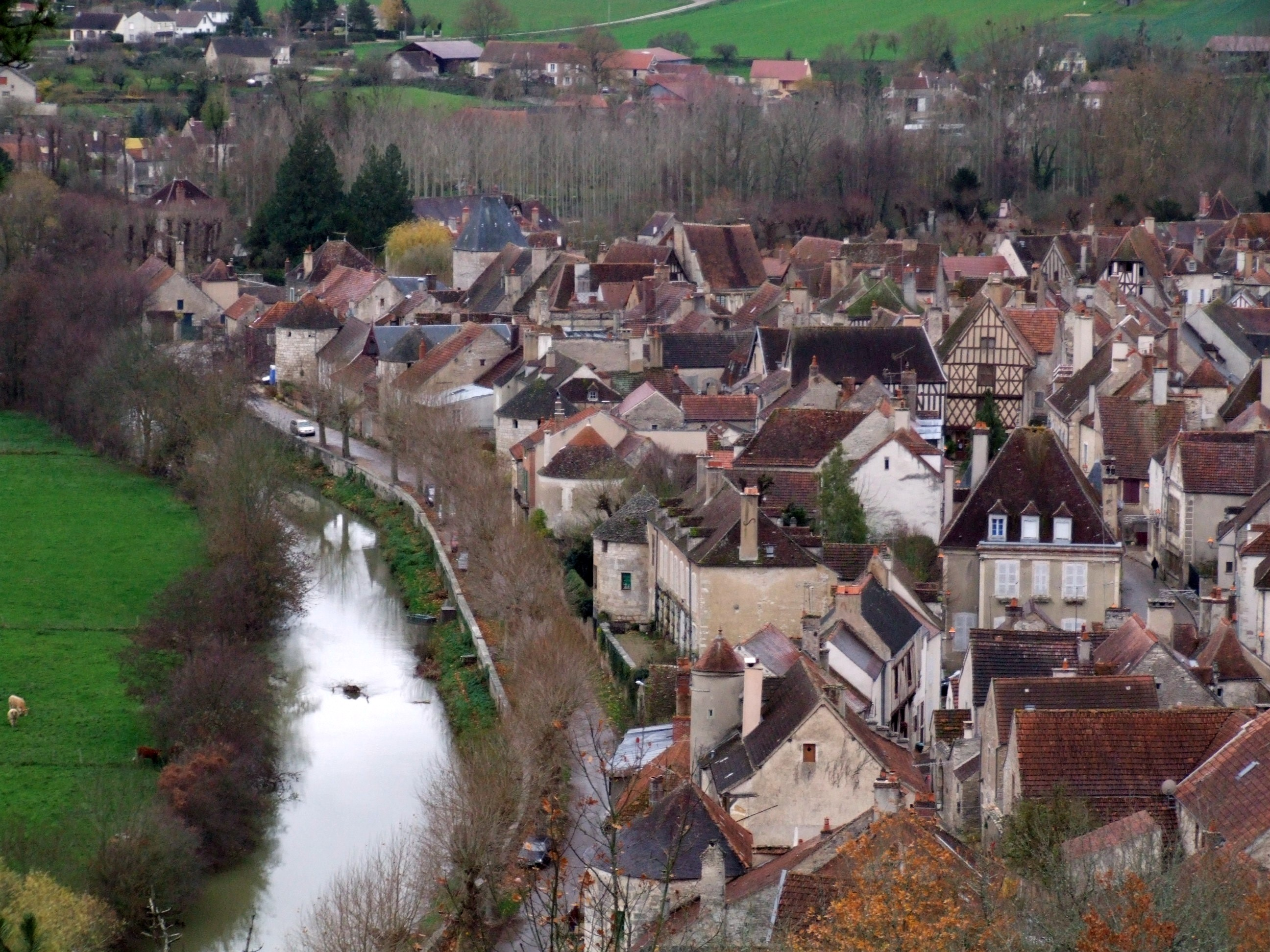 Vue panoramique de Noyers-sur-Serein à partir la montagne Saint-Georges,Noyers-sur-Serein, Yonne, Bourgogne, FRANCE